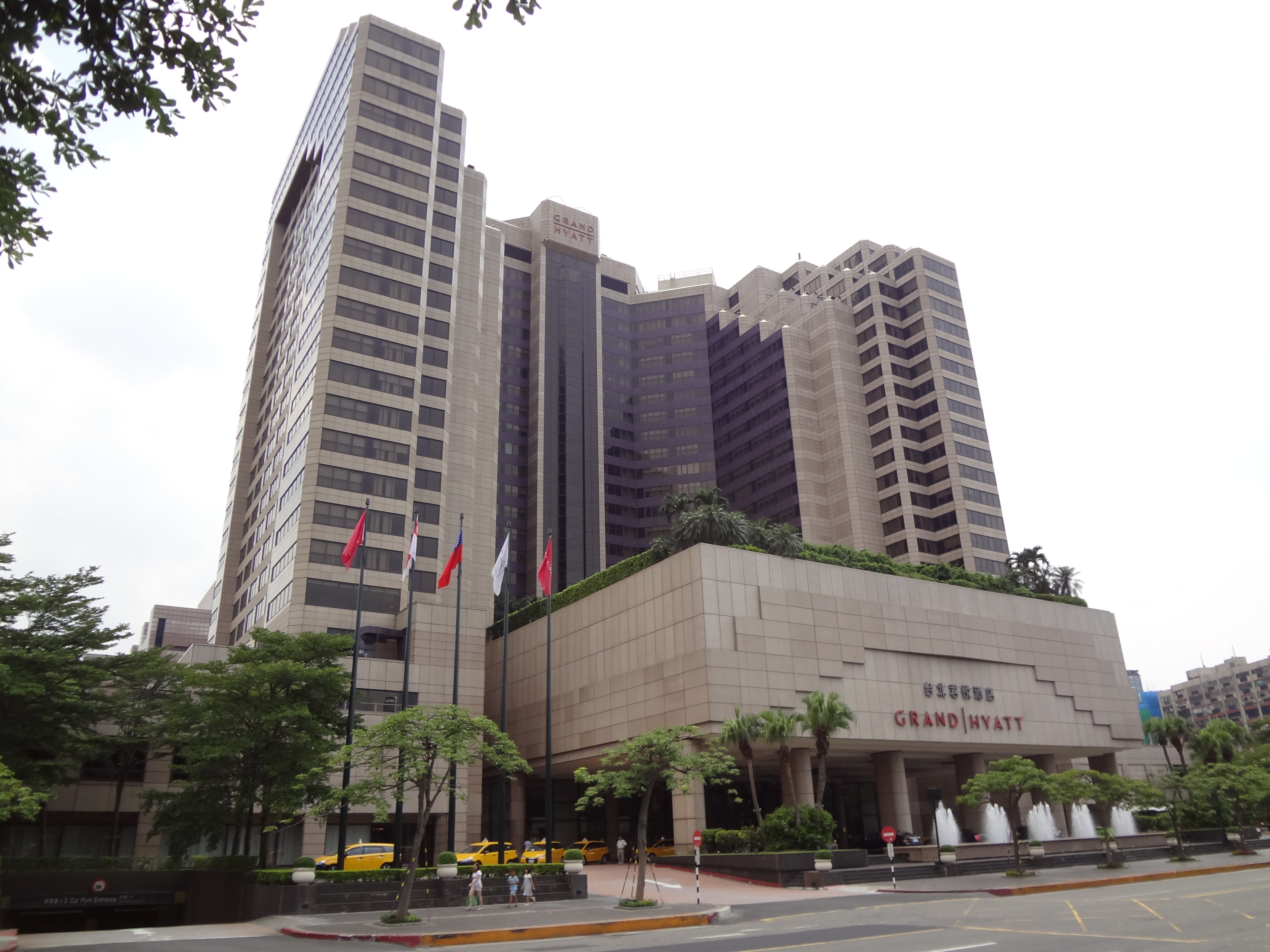 台北君悅酒店正面外觀。